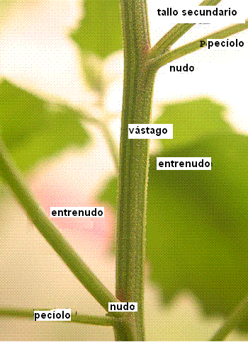 tallo mostrando nudos y entrenudos, y un tallo secundario